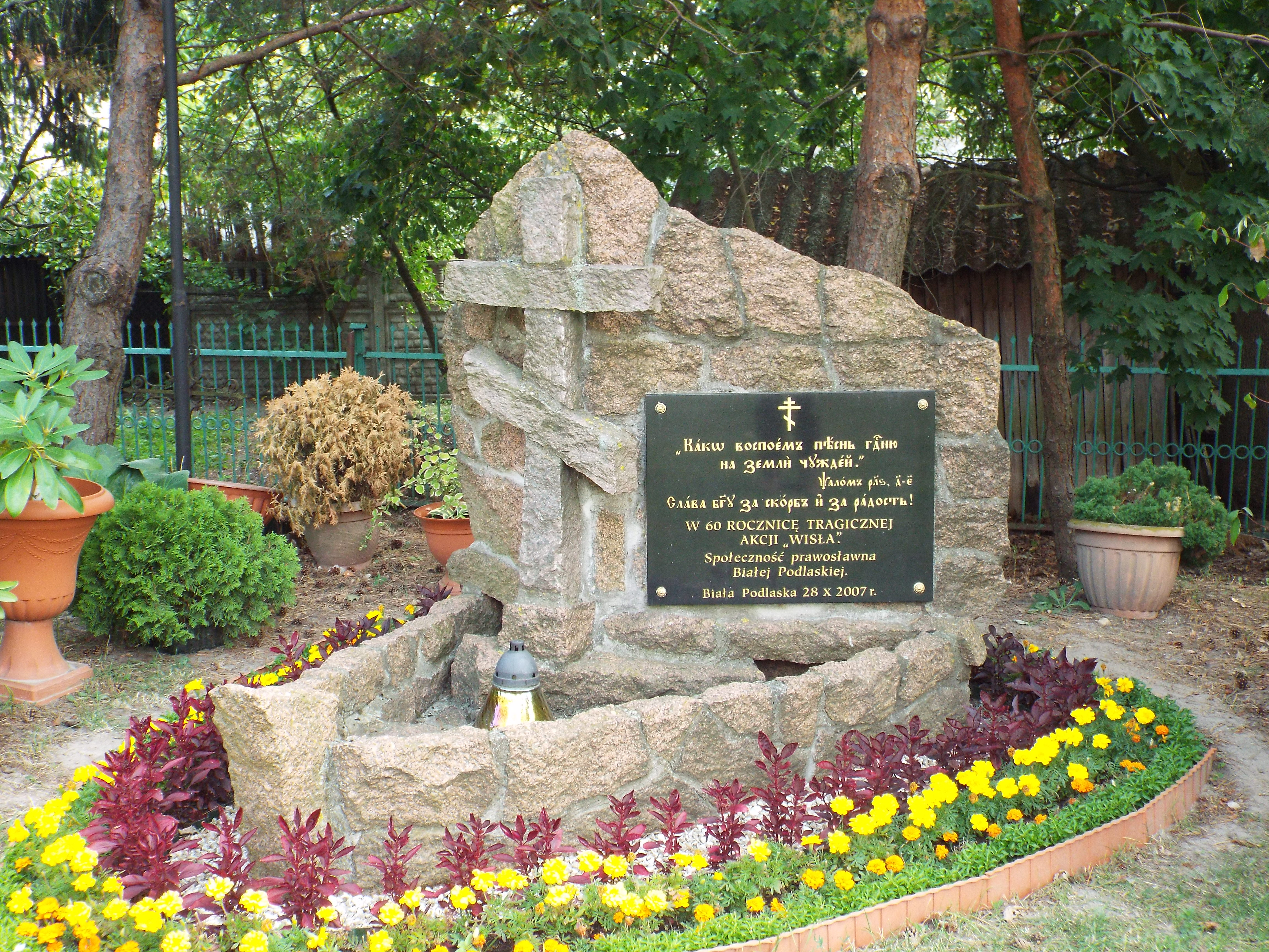 Biała Podlaska, cmentarz prawosławny - pomnik "Akcji Wisła"